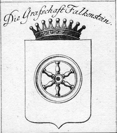 Wappen der Reichsgrafschaft Falkenstein (heute in Rheinland-Pfalz)